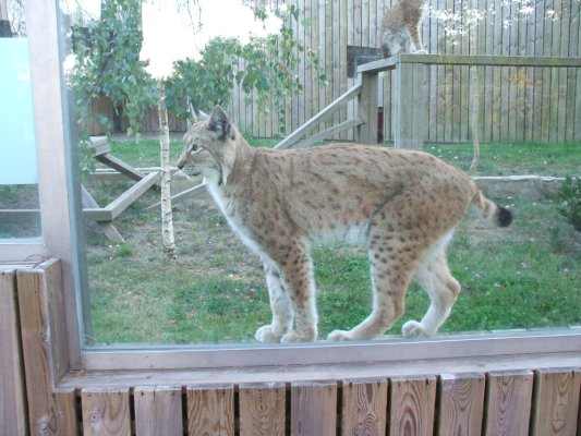 Lince vigozoo